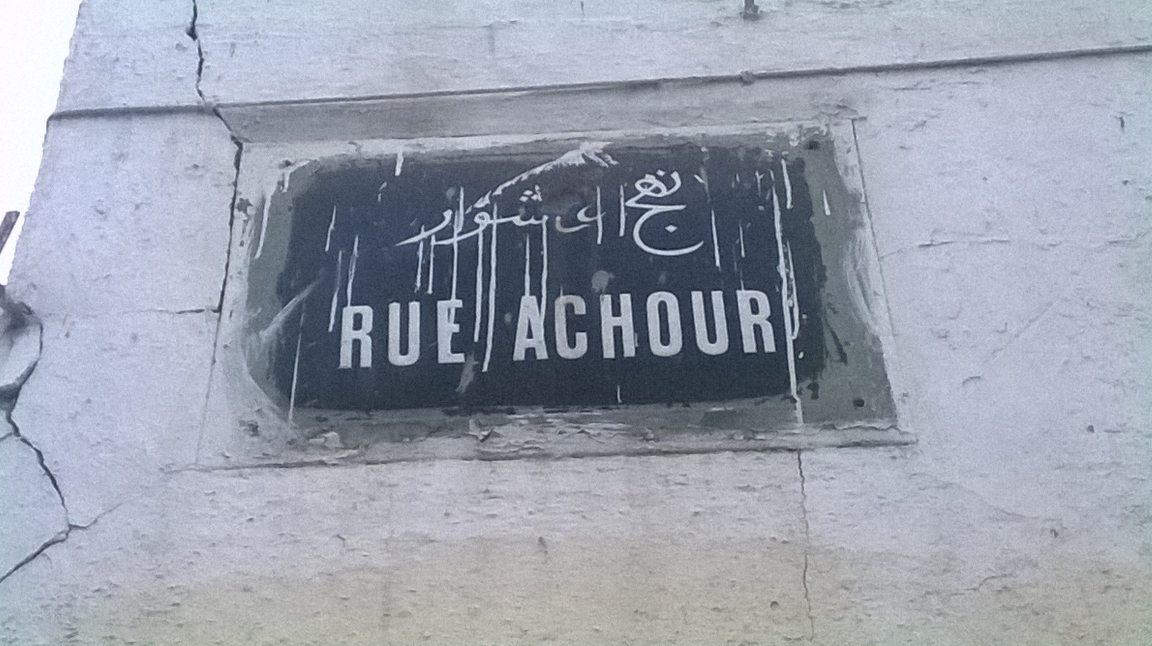 La médina de Tunis مدينة تونس العتيقة